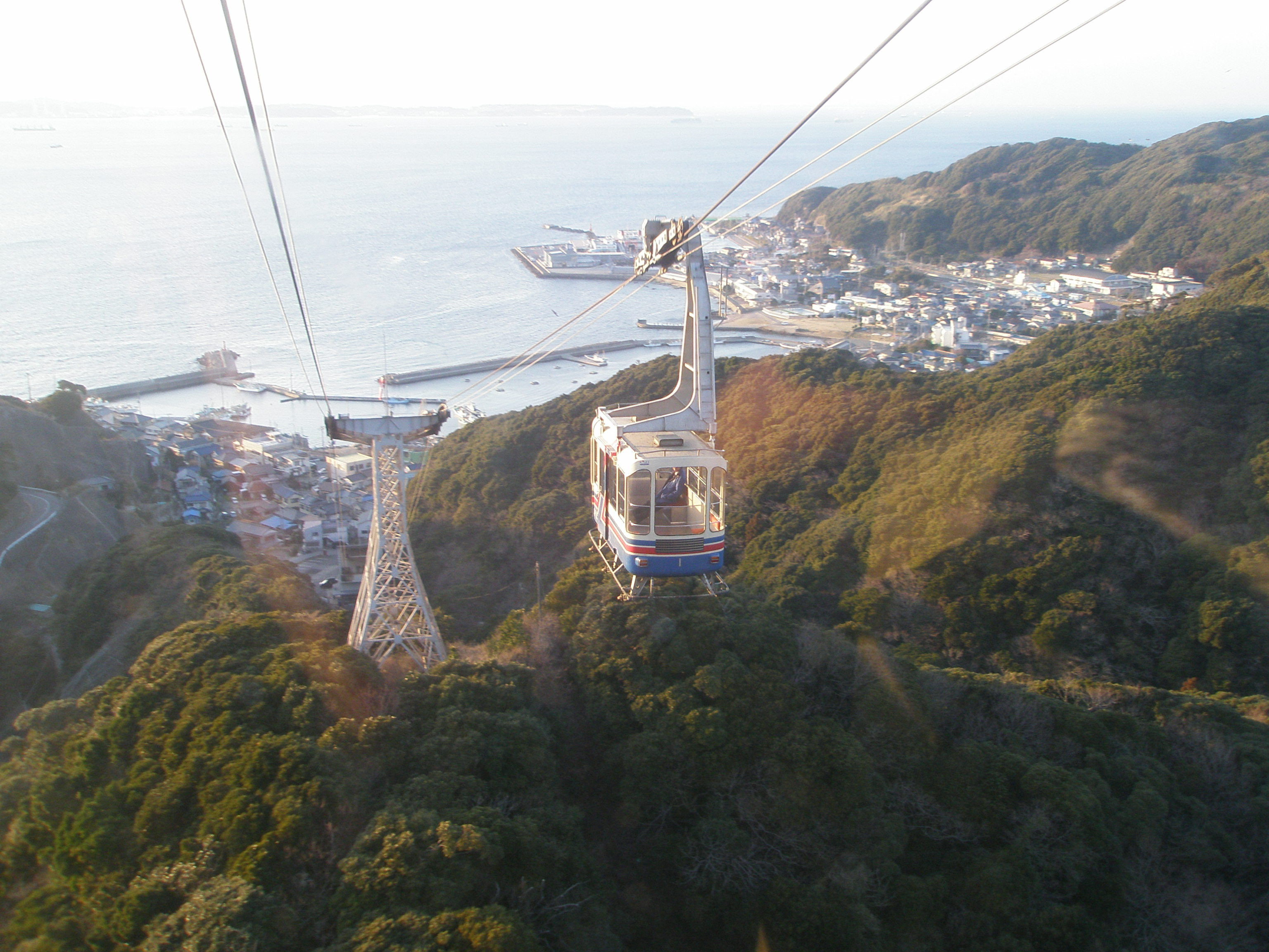 鋸山ロープウェー、すれ違い